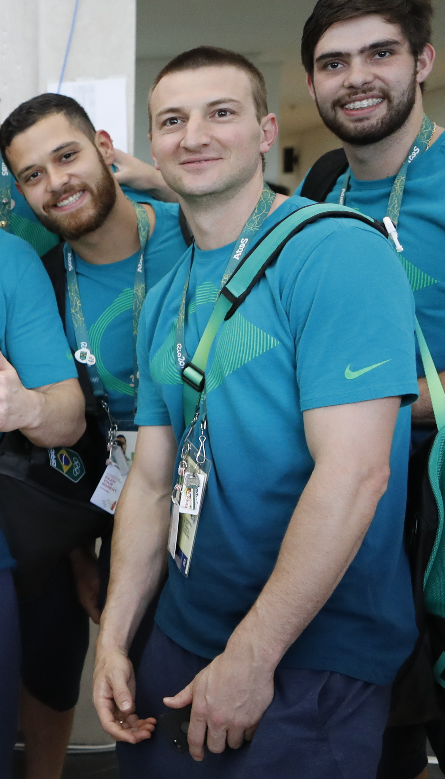 Rio de Janeiro - O campeão mundial de surfe Gabriel Medina visita atletas brasileiros de handebol, na Vila Olímpica dos Jogos Rio 2016 (Fernando Frazão/Agência Brasil)